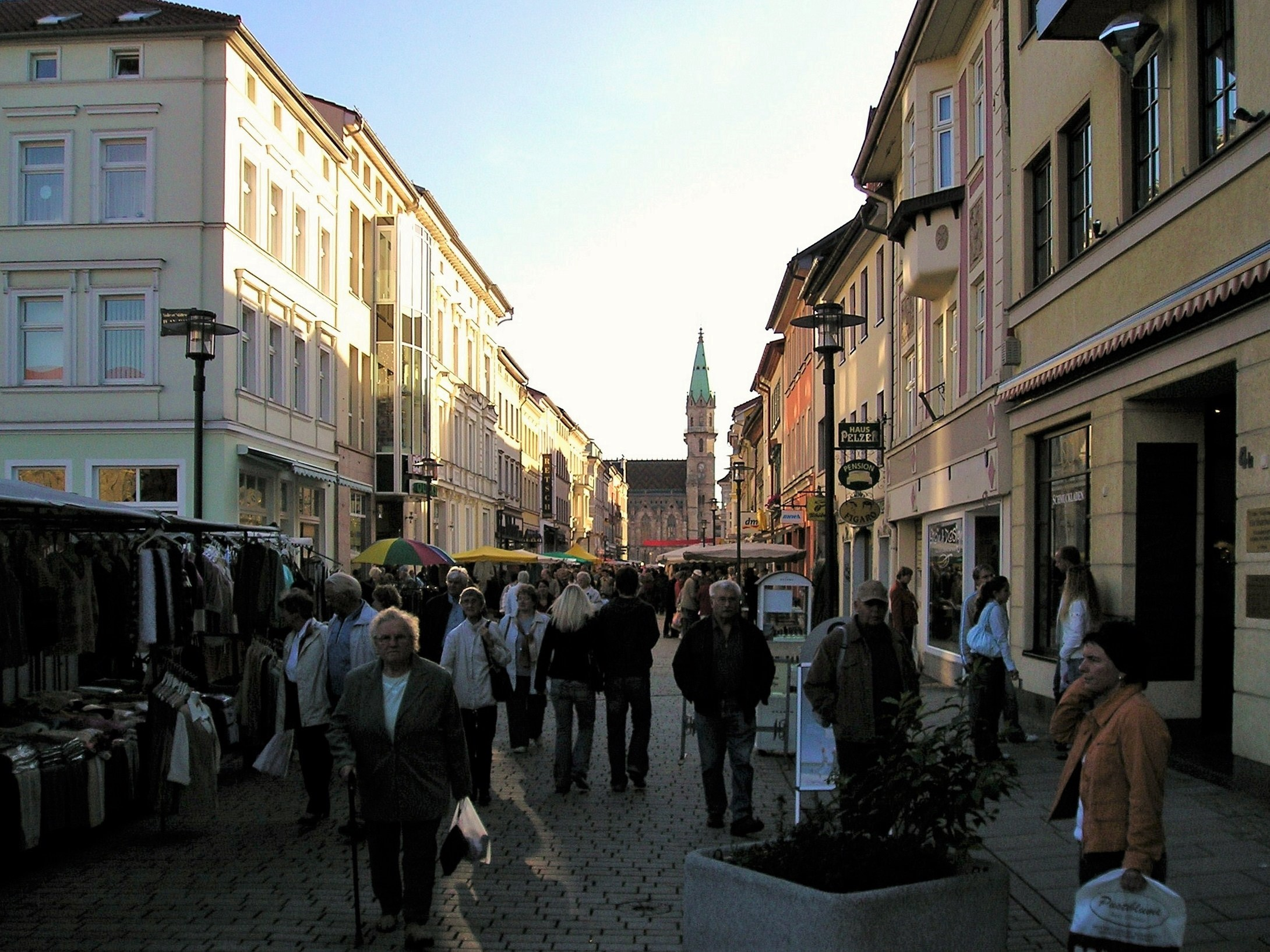 Sondermarkt "Meininger Herbst" im Jahr 2006